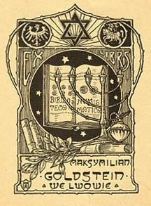 Екслібріс Максимільяна Гольдштейна. Автор Рудольф Менкіцький (1887—1942).